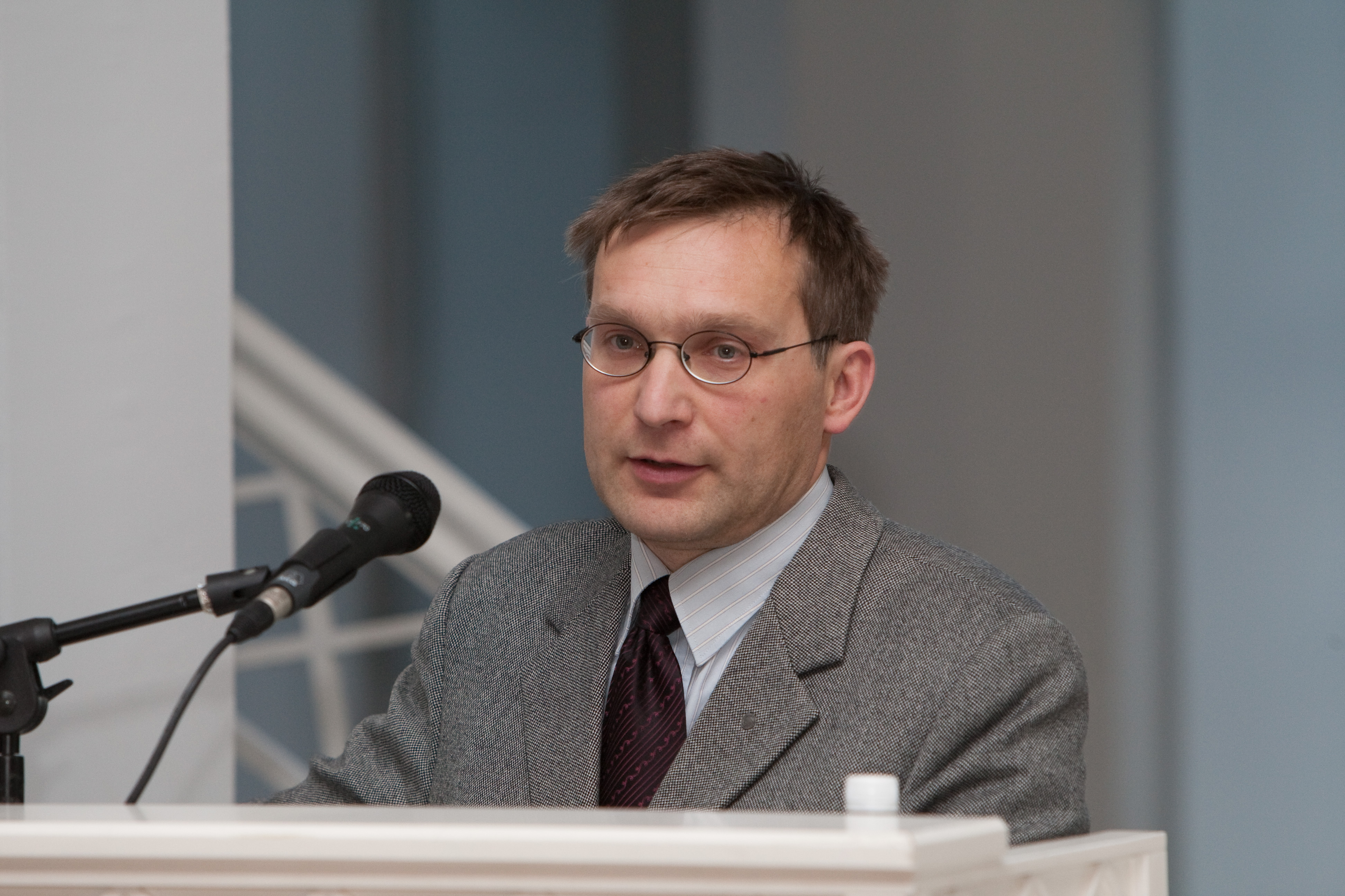 Tartu Ülikooli botaanika professor Meelis Pärtel esinemas ettekandega"Bioloogilise mitmekesisuse mustrid" TÜ bioloogilise mitmekesisuse tippkeskuse avaseminaril 12. jaanuaril 2009 TÜ ajaloo muuseumi valges saalis.